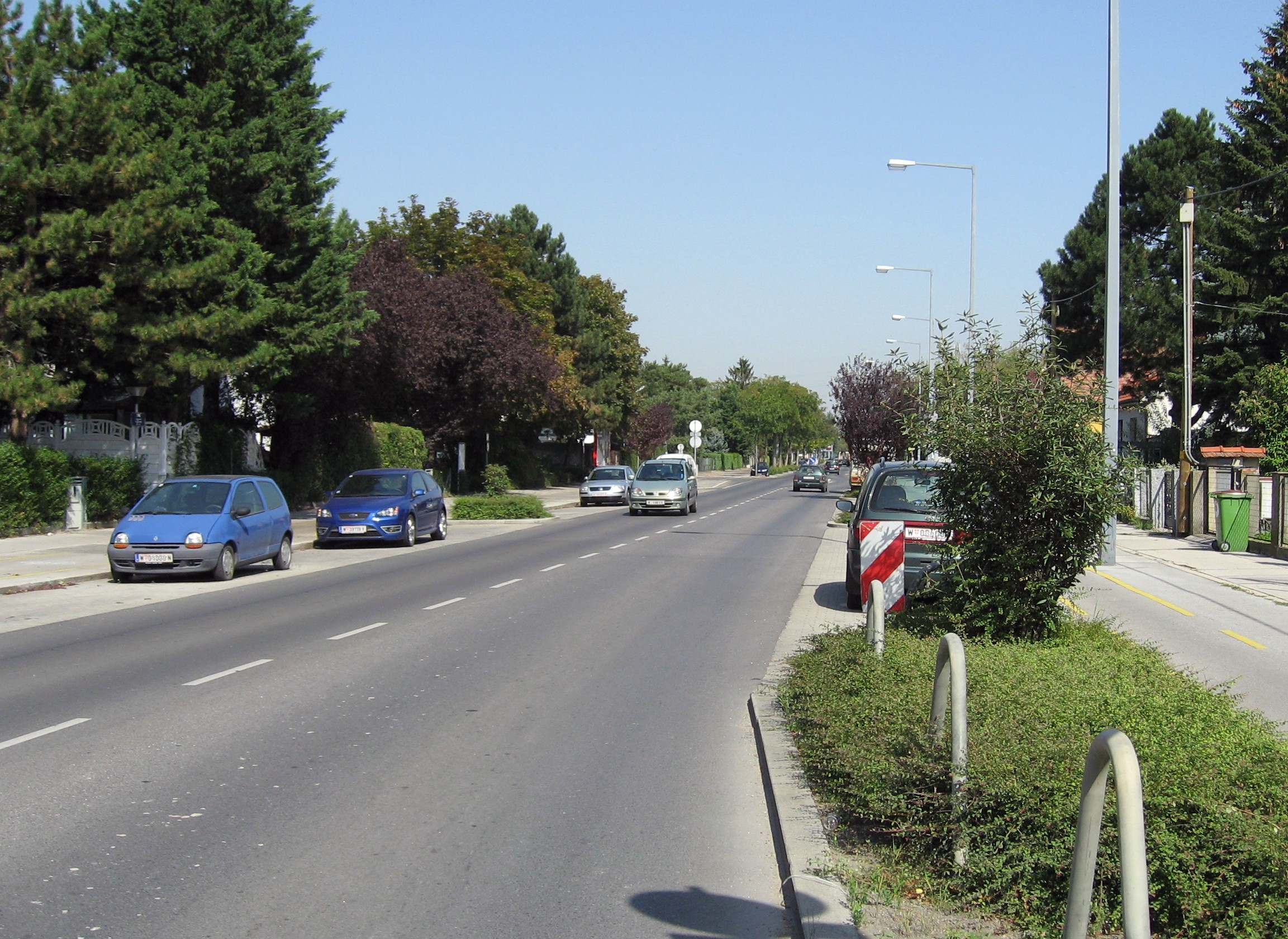 Biberhaufenweg in Wien Donaustadt